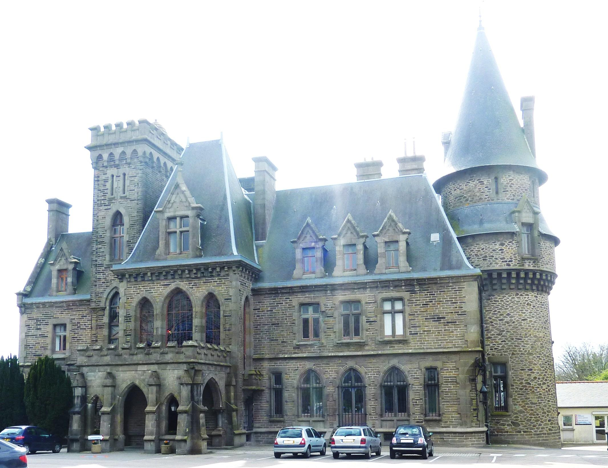 Brest-Saint-Marc : le château de Ker Stears (Cours Fénélon)